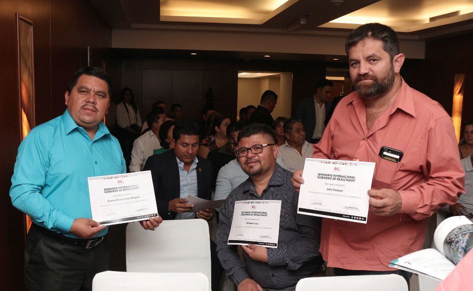 Asistentes a la capacitación del Seminario Internacional Gobierno de Resultados